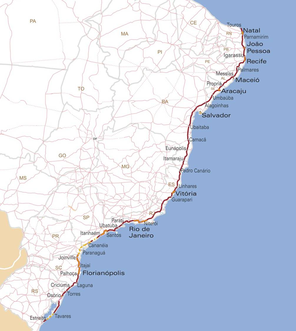 Mapa descritivo da BR-101 em relação as outras rodovias brasileiras.